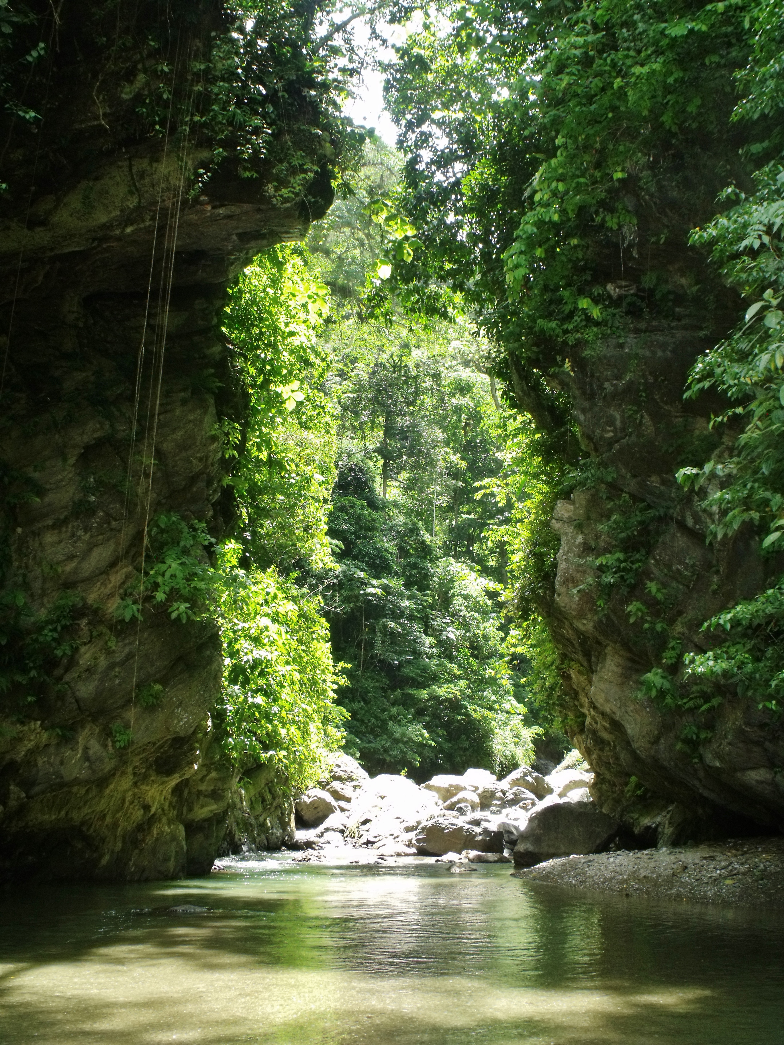 Piedras Gemelas esta especie de puerta en la montaña quedan en el municipio Zamora del estado Miranda. Parroquia Bolívar, Pueblo de Salmeron, en el rio Salmerón arriba en el sector Brazo Grande, sector Ñoloyo. P.N. Waraira Repano